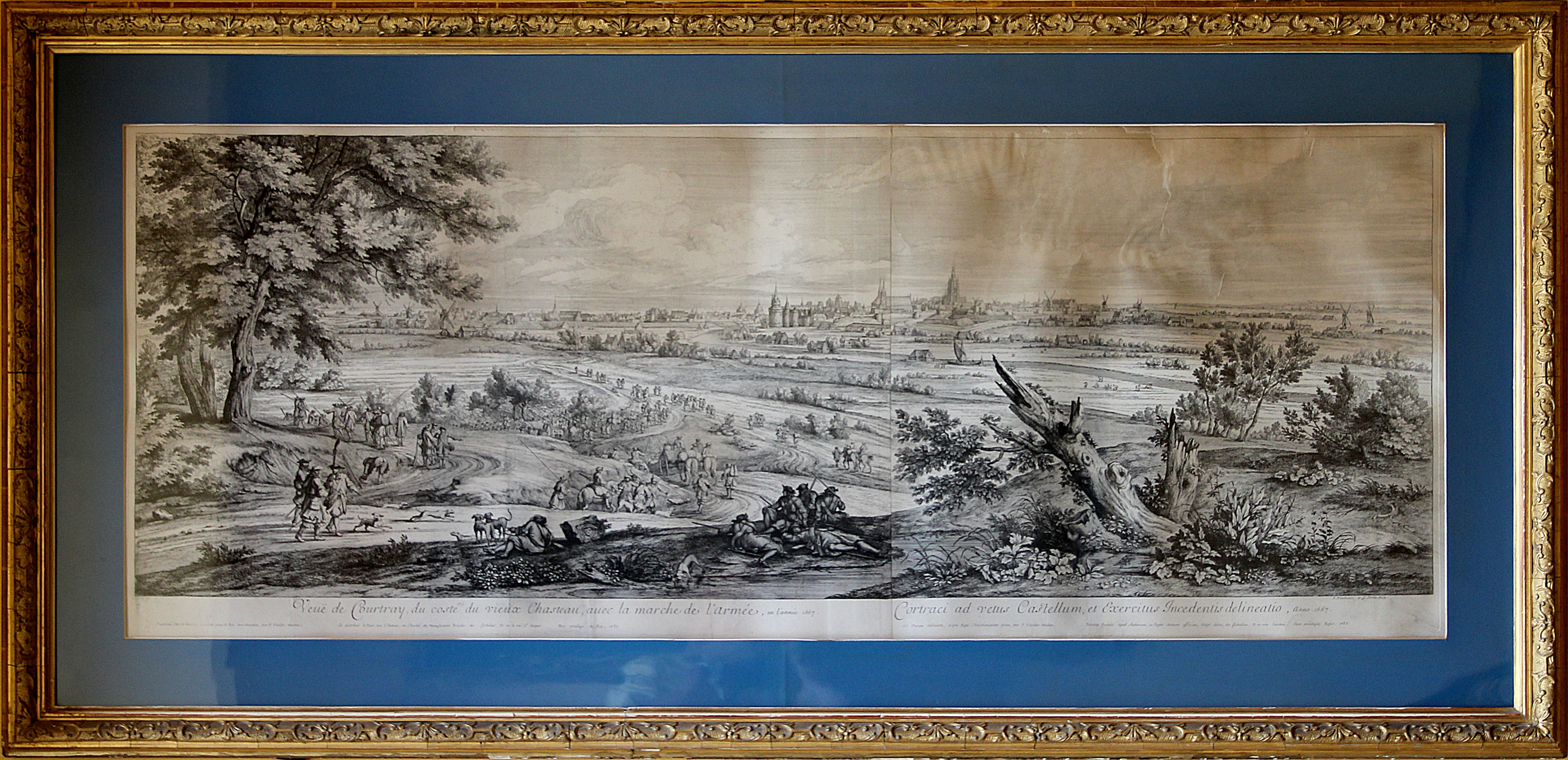 Gravure « Veuë de Courtray du costé du vieux Chasteau, avec la marche de l’armée, en l’année 1667 » réalisée par Adam François van der Meulen appartenant aux collections du château de Vaux-le-Vicomte - Maincy (Seine-et-Marne, France).